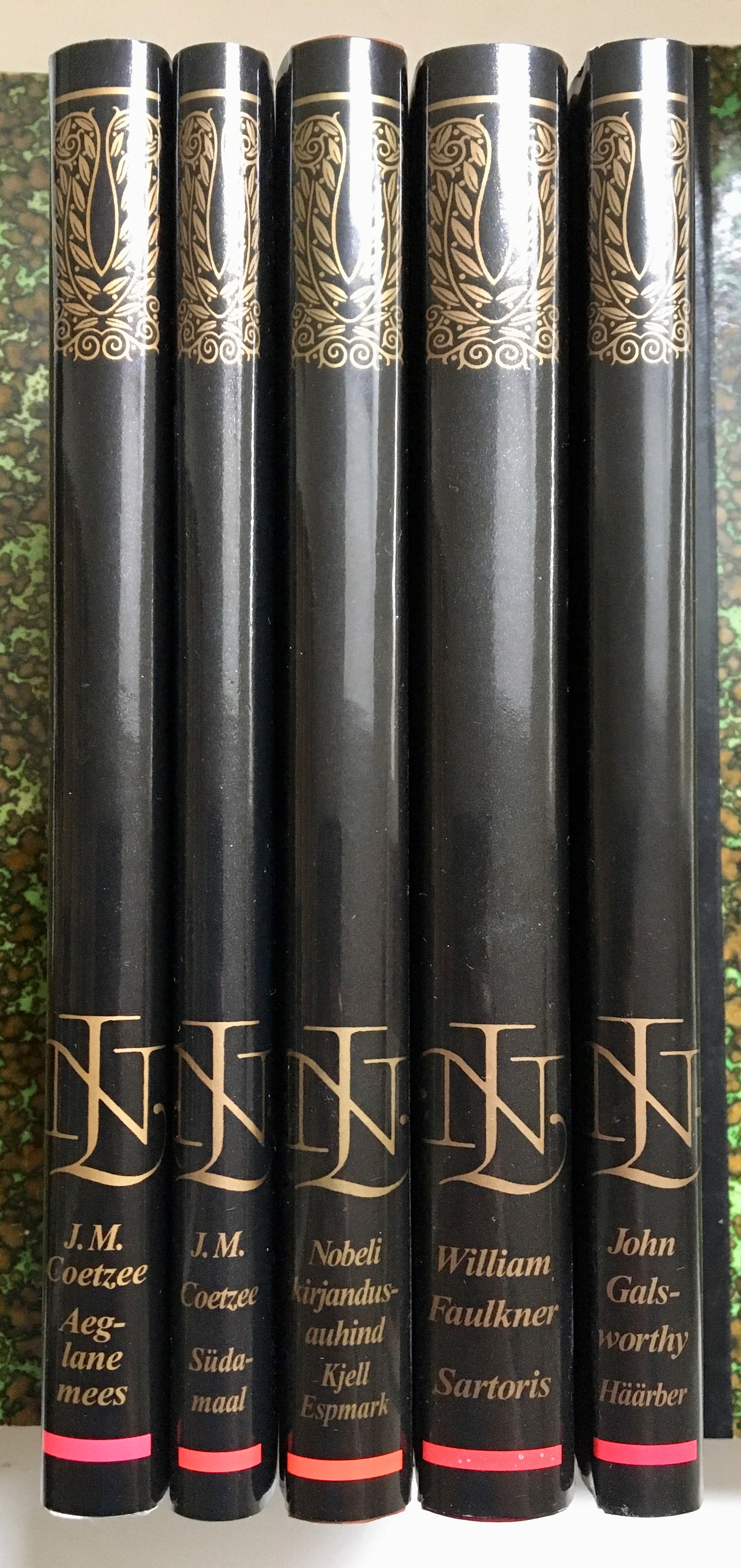 Nobeli ümbrispaberi seljad